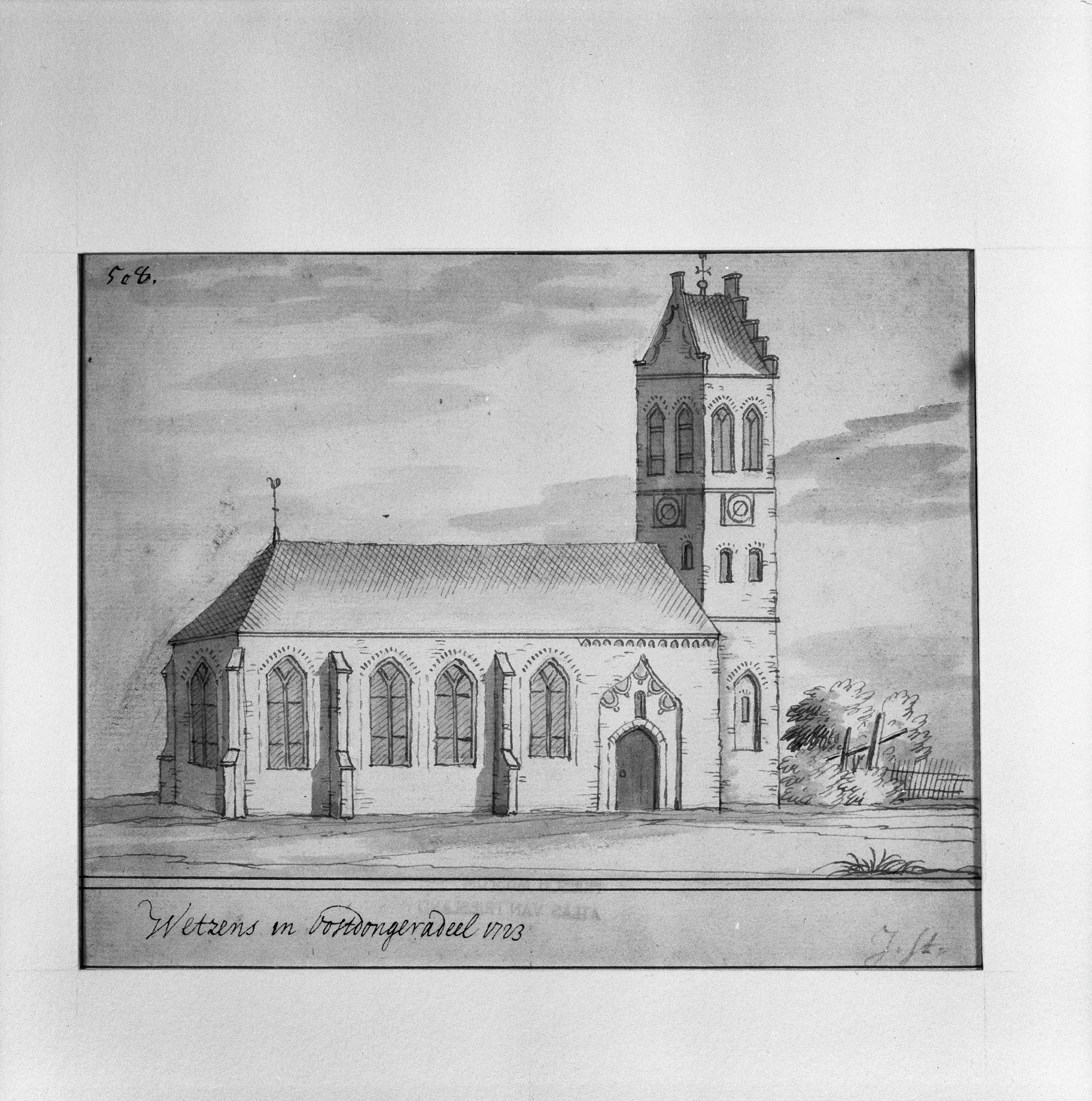 Nederlands Hervormde Kerk: kerk in 1723, tekening Stellingwerf Collectie Fries Museum